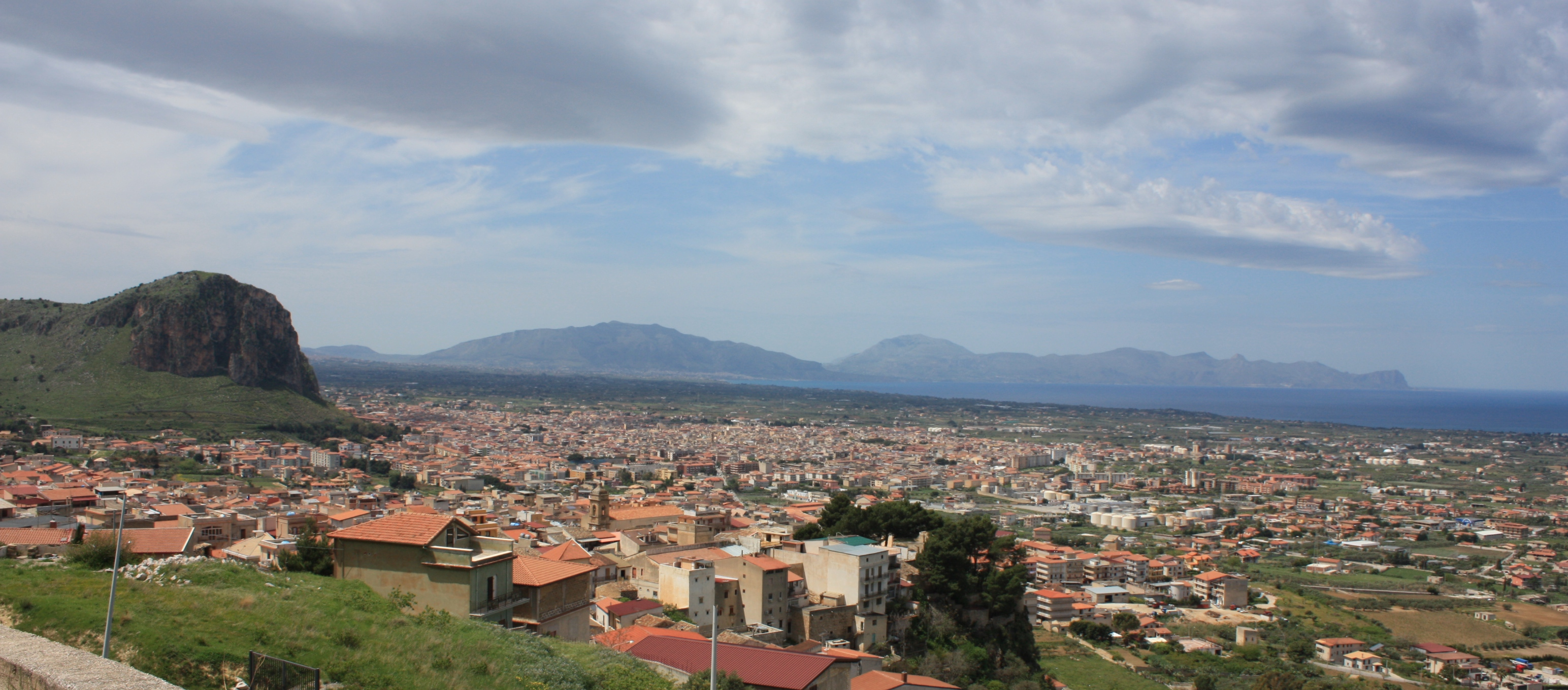 Partinico vista da Romitello